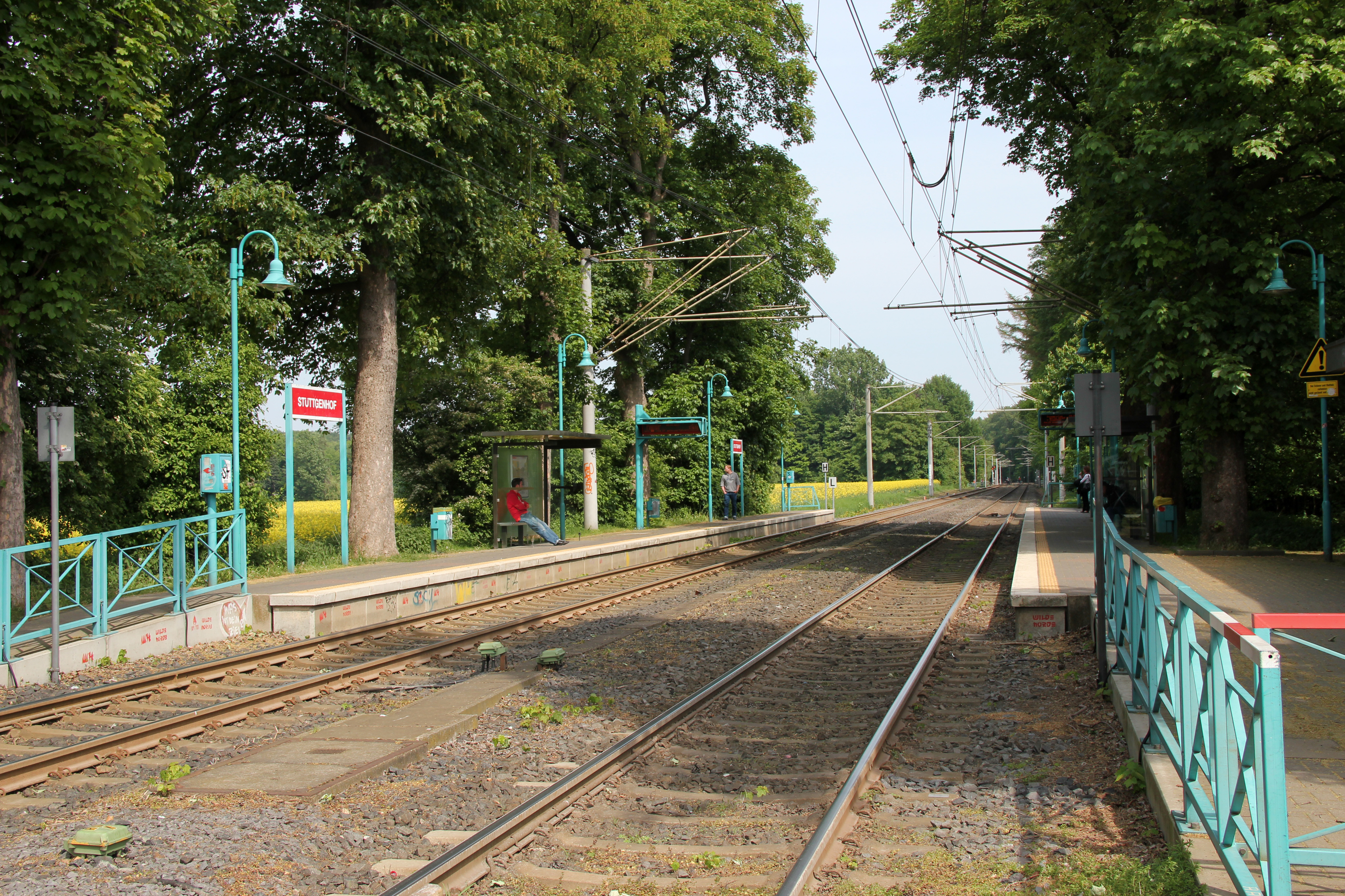 KVB-Station Stüttgenhof am Stüttgenweg der Stadtbahn Köln